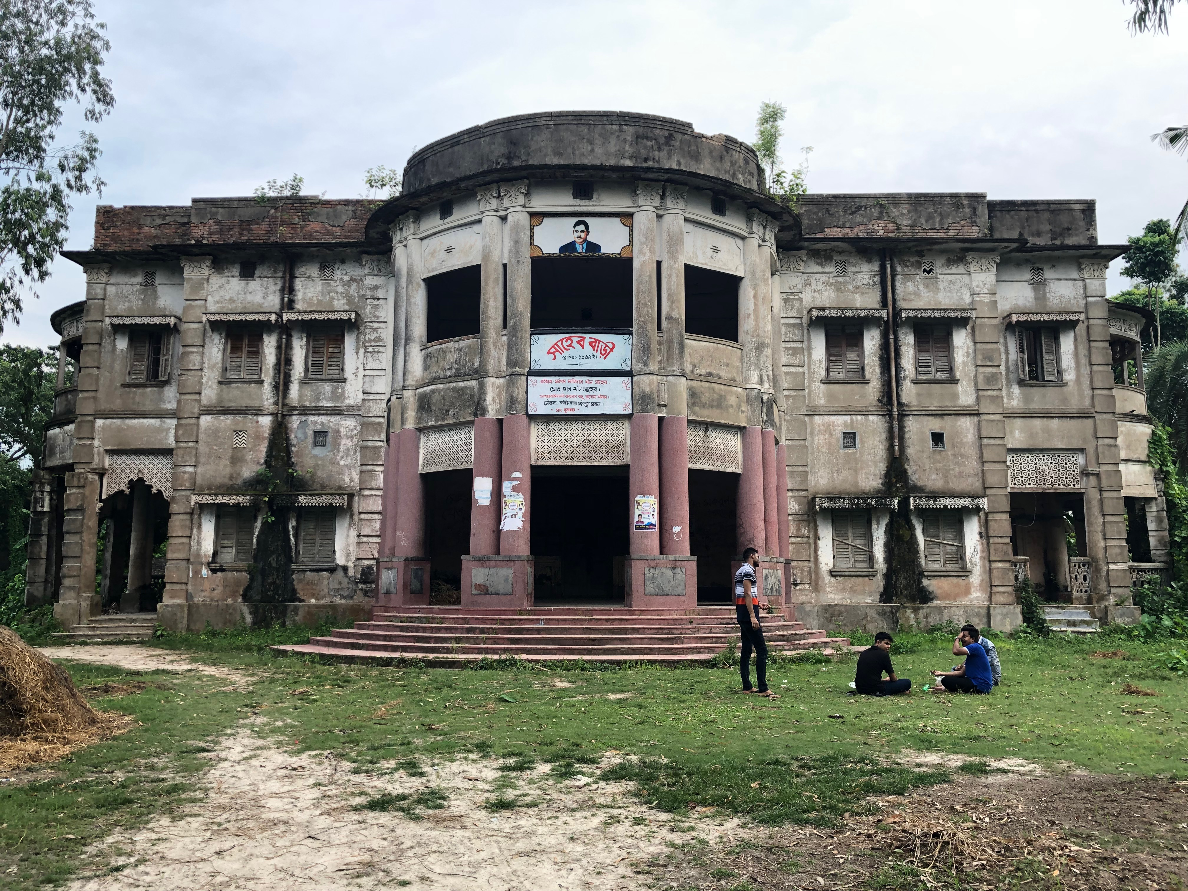 গুনাহার জমিদার বাড়ির সামনের অংশ